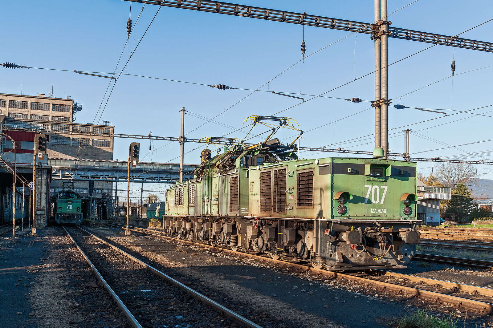 Důlní odklizové lokomotivy řady 127 (27E) čísel 701 a 707 při práci v ÚUK (Úpravna uhlí Komořany).